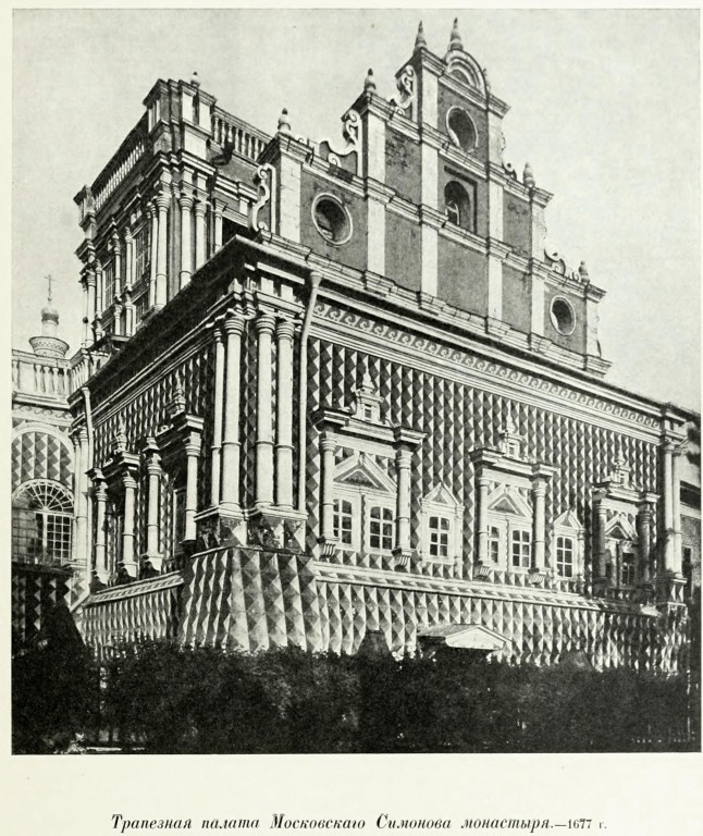 Трапезная Симонова монастыря, Москва